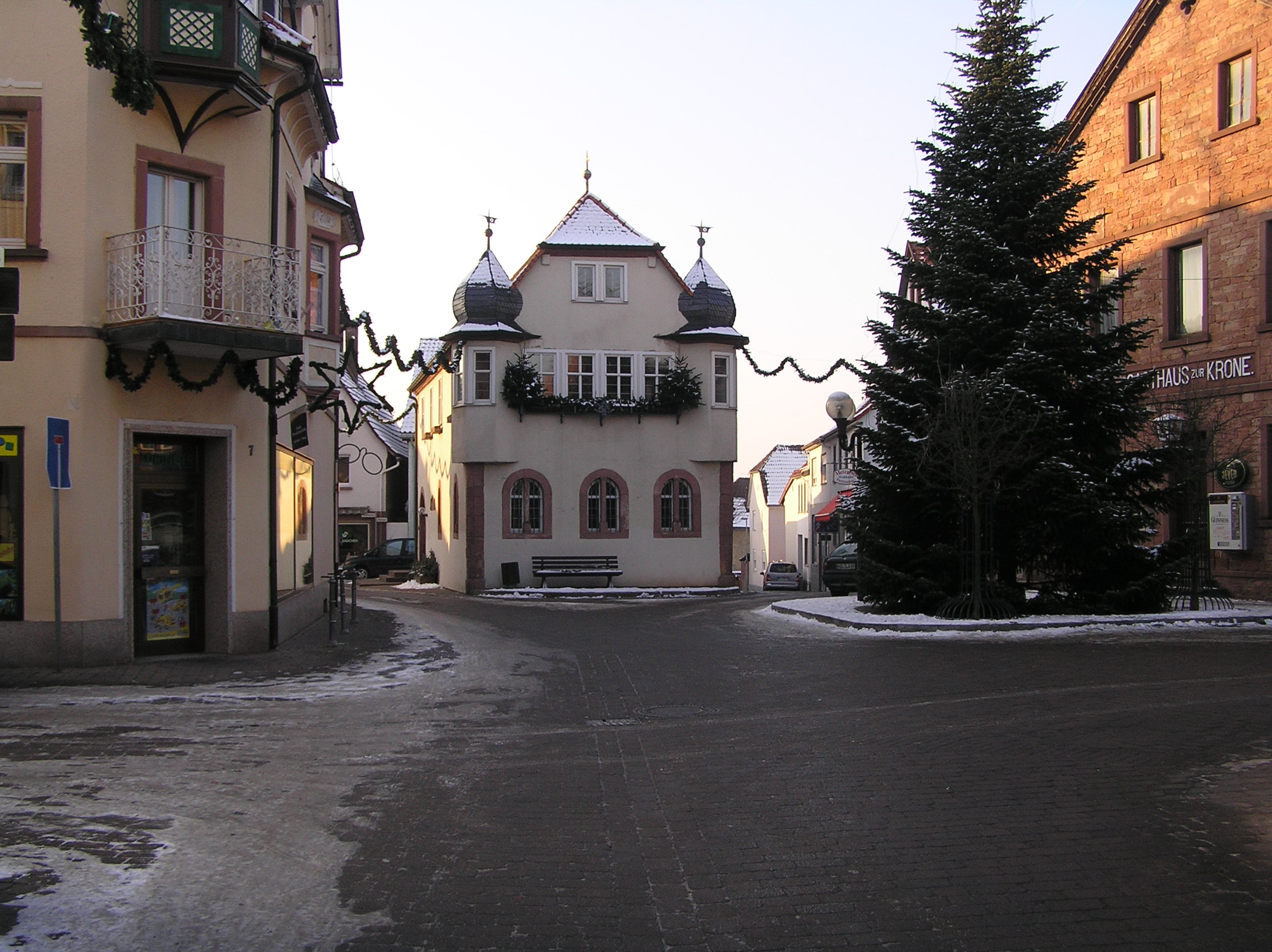 Die Ortsmitte von Kleinwallstadt